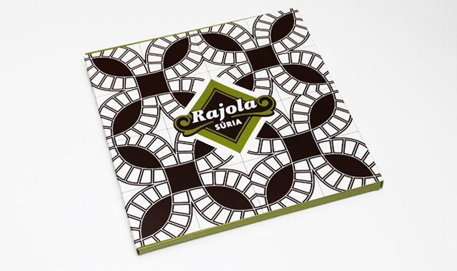 Rajola de xocolata que reprodueix el dibuix del Panot Súria. Manufacturat per la Fleca de la Font (Súria), el disseny gràfic és de Coaner Codina Pich.